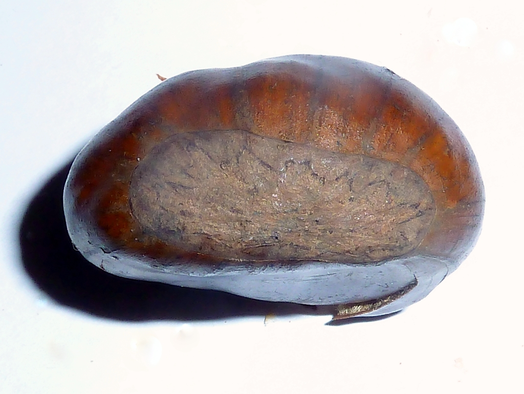 Castanea sativa cv. "Nigral" (Castaño común) : Aquenio maduro, cicatriz basal con su marca estrellada/"explotada" correspondiendo a su fijación en la cúpula - Origen, Villafranca del Bierzo (Provincia de León), comercio, Madrid (España).